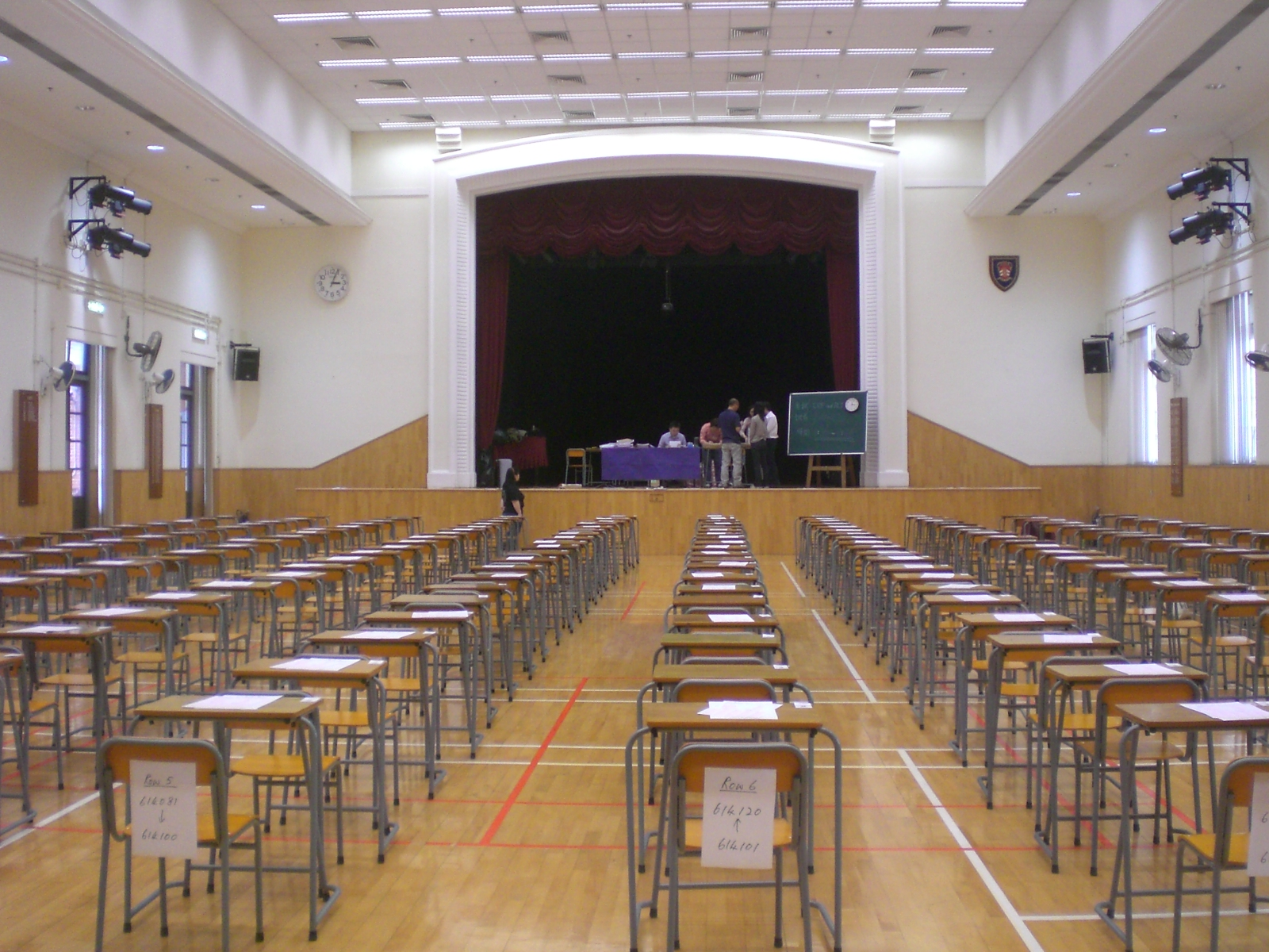 禮堂, 英皇書院, 般咸道